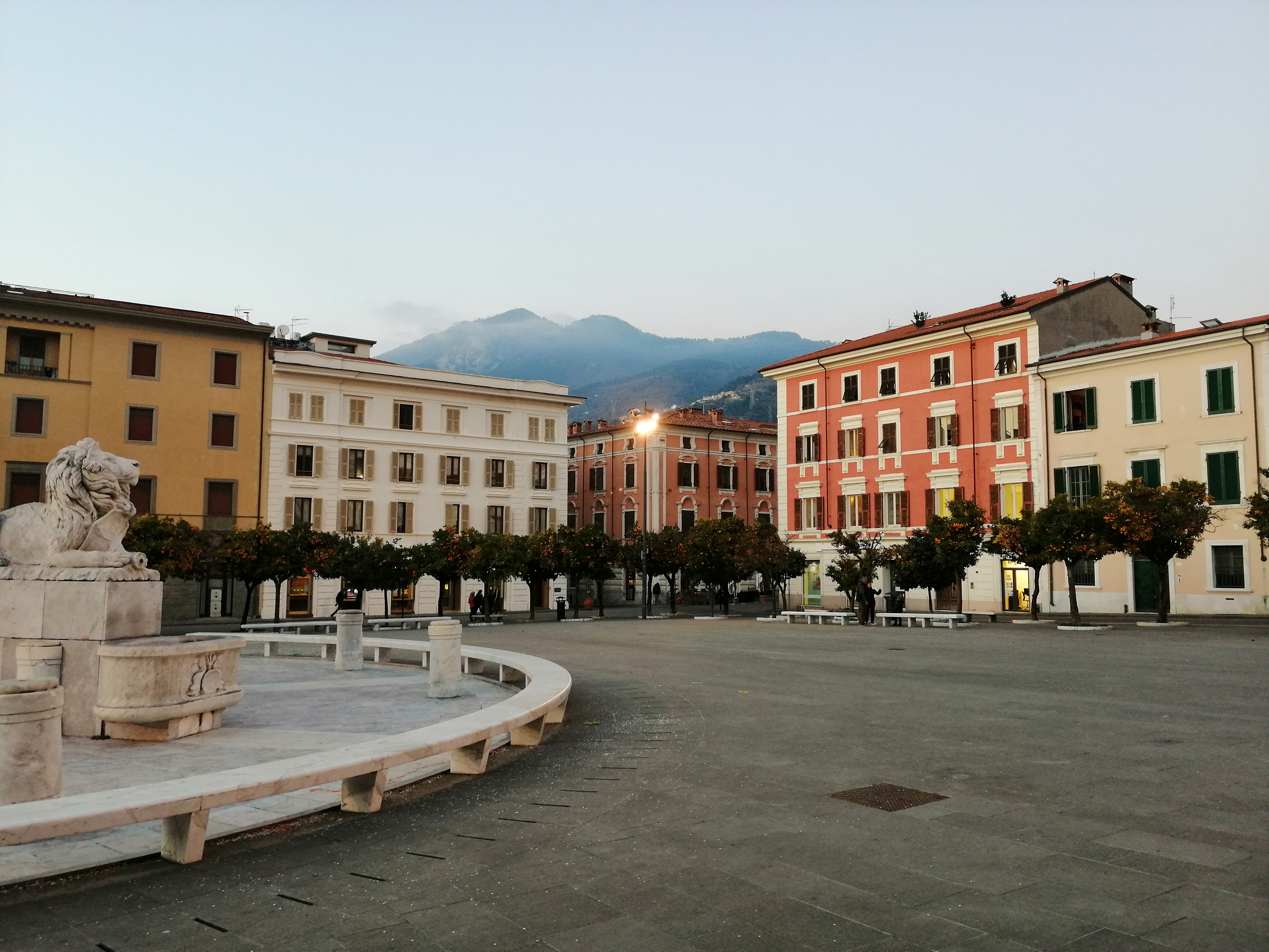 Piazza Aranci è la piazza principale di Massa. Celebre edificio della piazza è il Palazzo Ducale, chiamato anche "Palazzo Rosso".